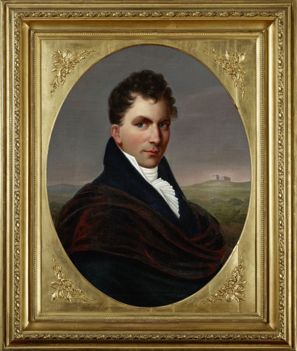 Louise Seidler, Porträt Bernhard August von Lindenau, vermutlich 1811